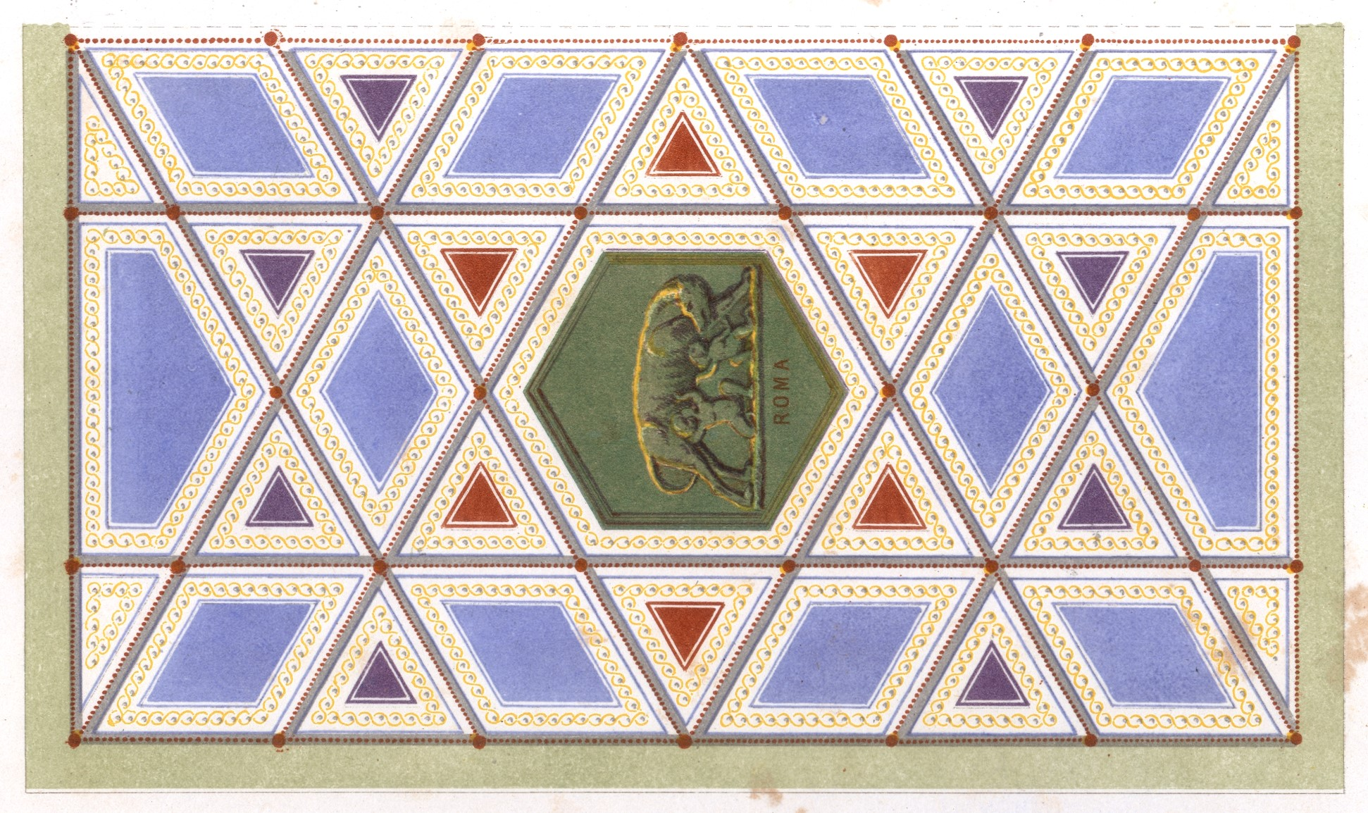 Berlin, Neues Museum: Decke des Römischen Saales